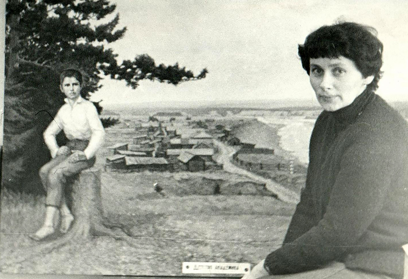 Нижнеилимский район Иркутской области